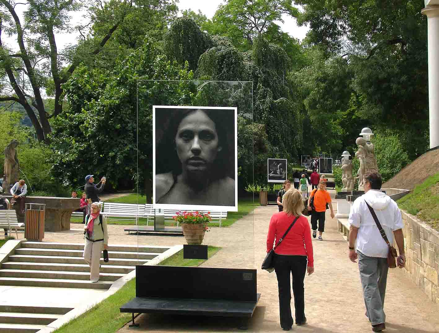 výstava Ivana Pinakvy